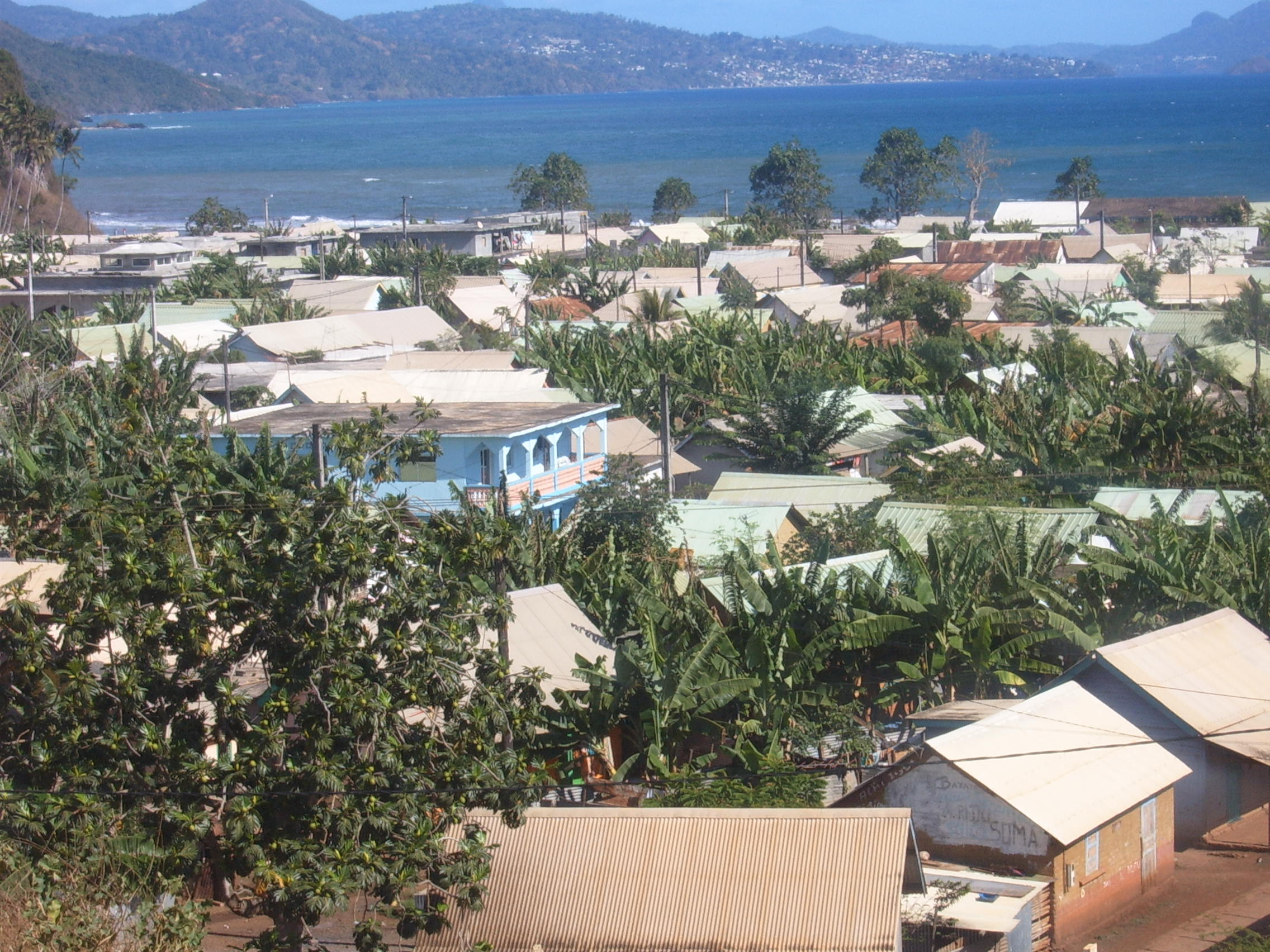 M'tsangamouji Centre